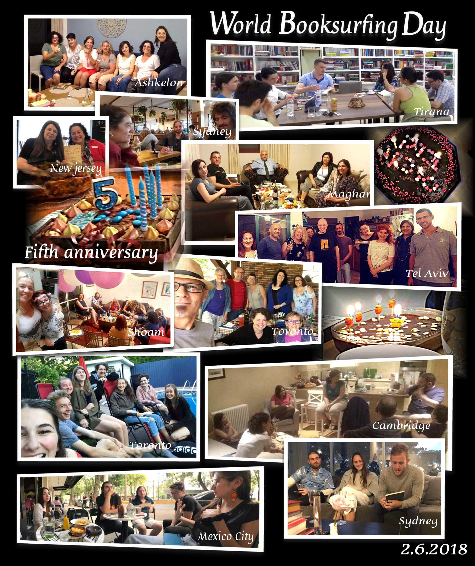 בוק סרפינג